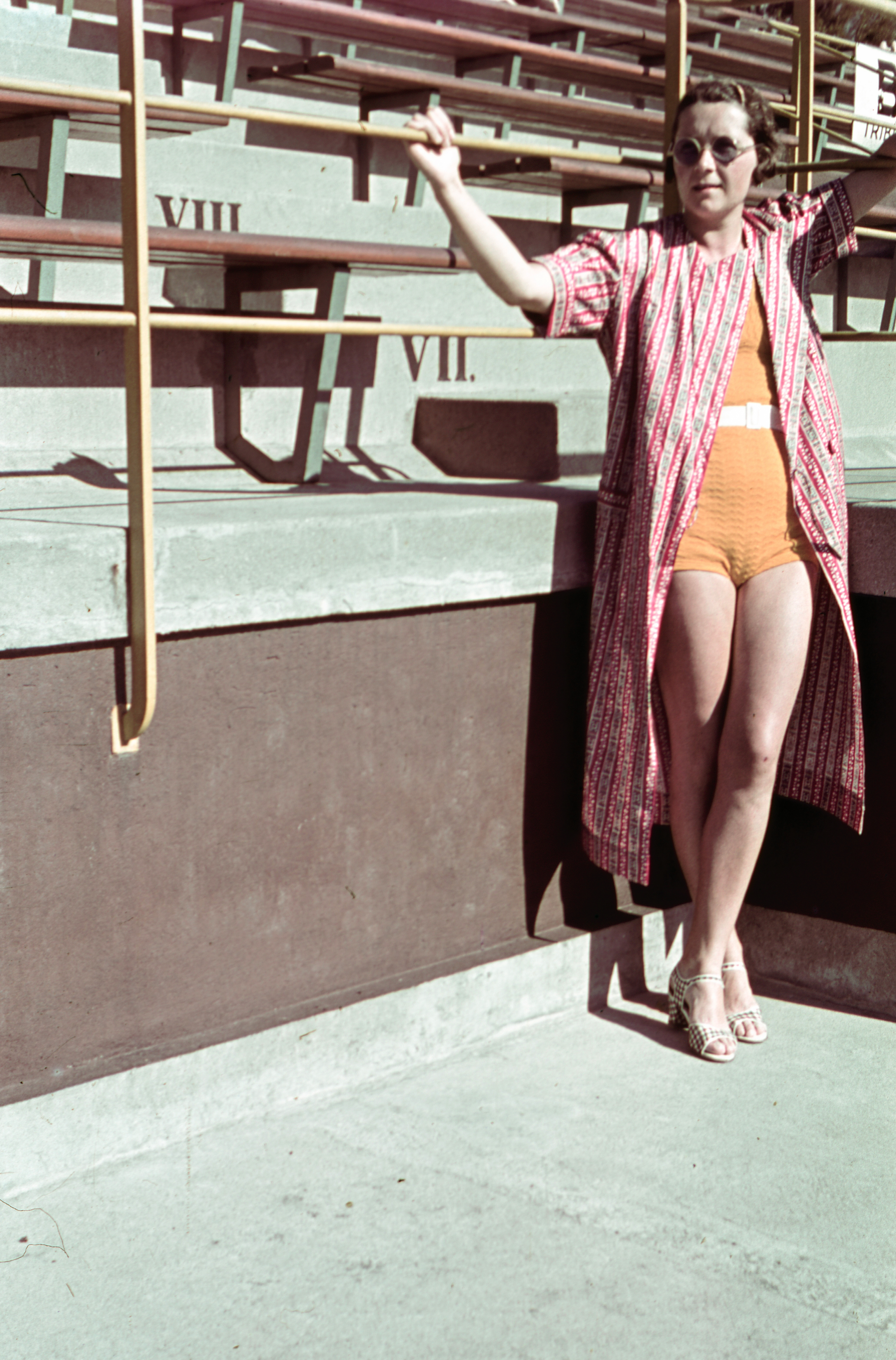 Hajós Alfréd Nemzeti Sportuszoda. Location: Hungary, Budapest, Margit Islands Tags: woman, portrait, bathing suit, bathrobe, shades, sunshine, summer, colorful Title: Hajós Alfréd Nemzeti Sportuszoda.